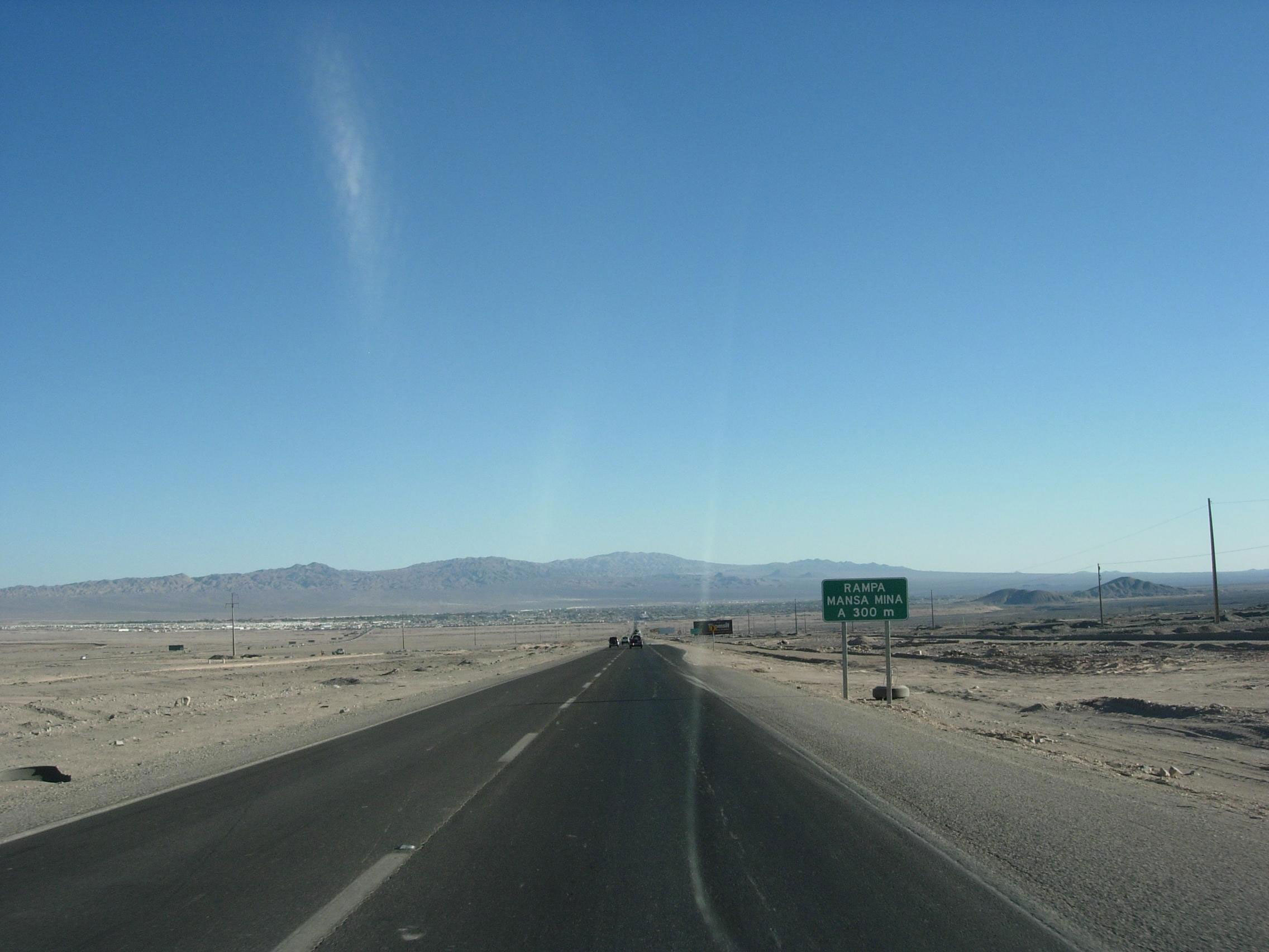 Die Hauptstraße von Norden führt an der großen Kupfermine vorbei hinunter nach Calama